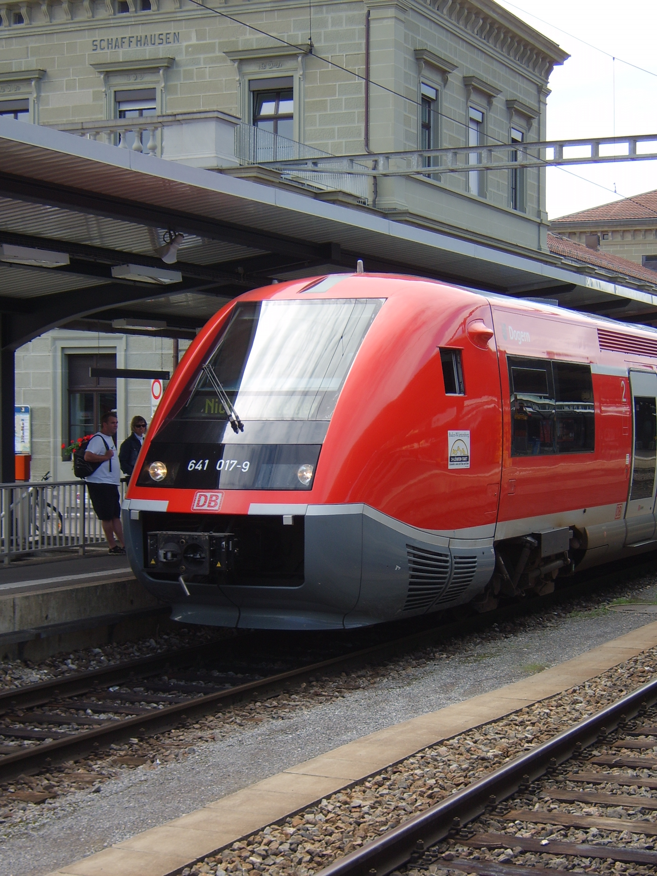 Coradia-Zug der DB im Bahnhof von Schaffhausen